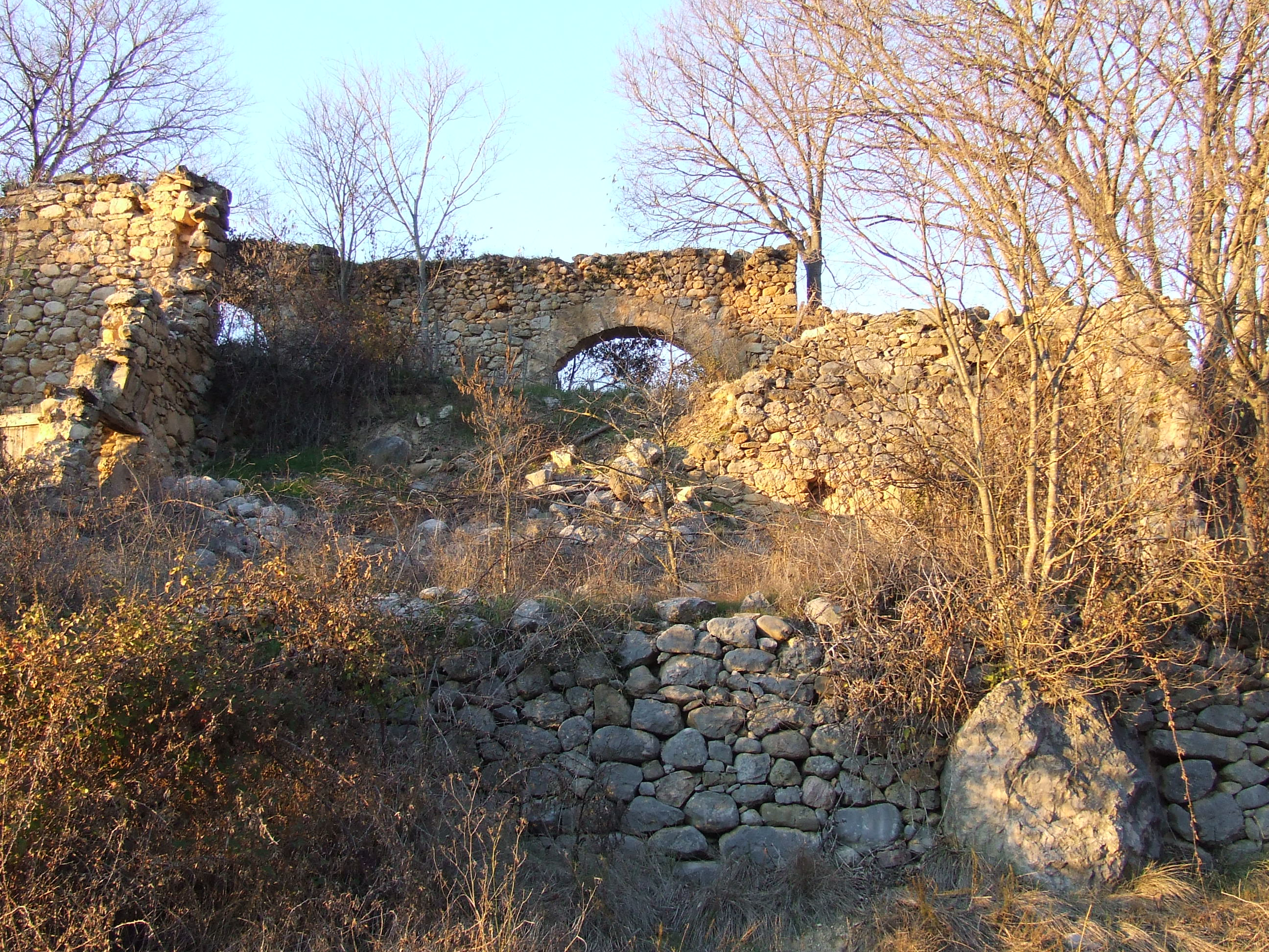 La Mallola (Abella de la Conca, Pallars Jussà)